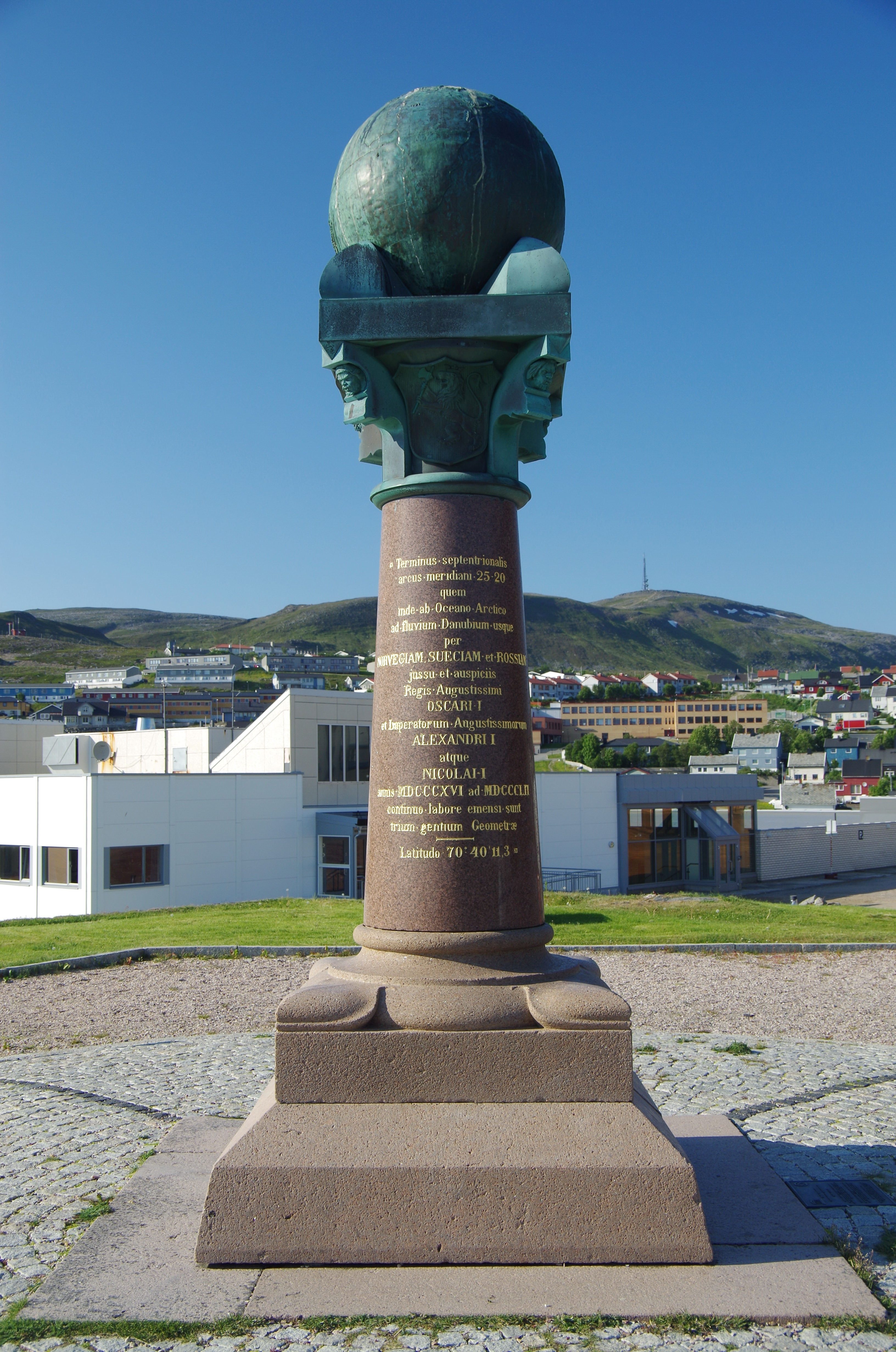 Struve-Säule auf der Halbinsel Fuglenes